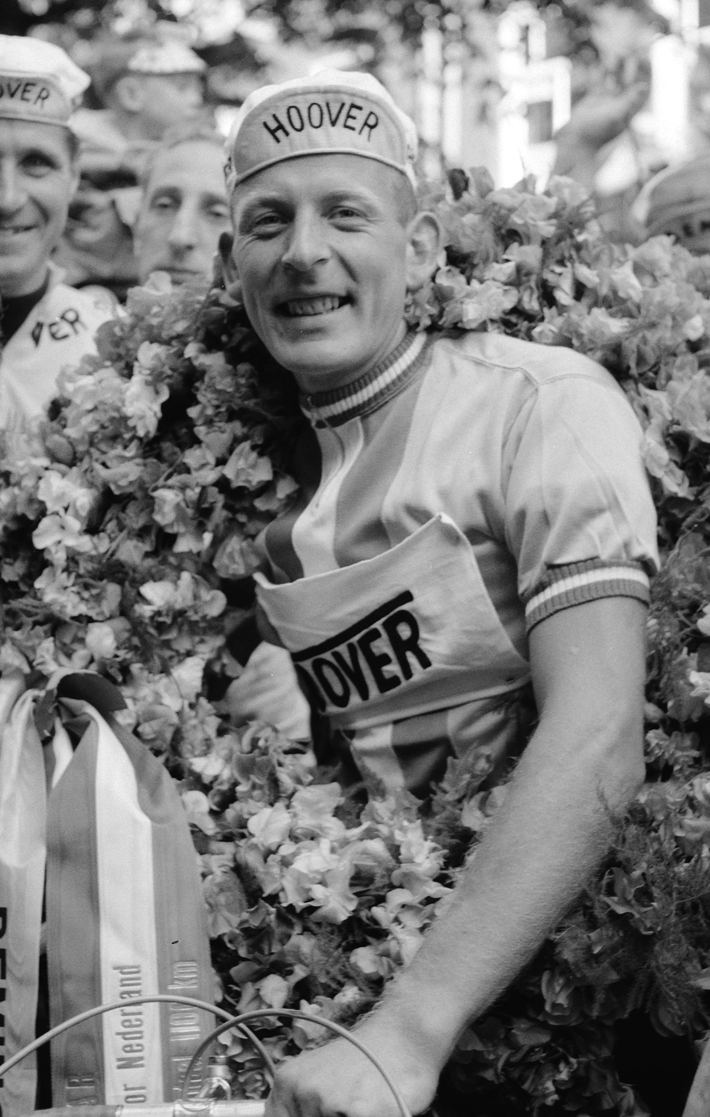 Finish Olympiatour in de Javastraat. Mik Snijder en Miss Remington